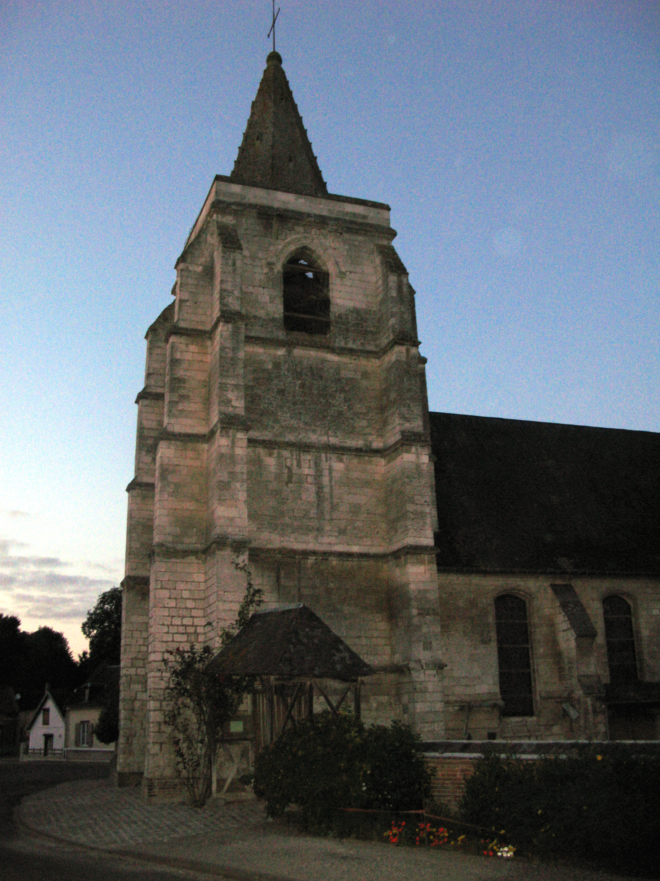 Franqueville (Somme, France) - L'église.